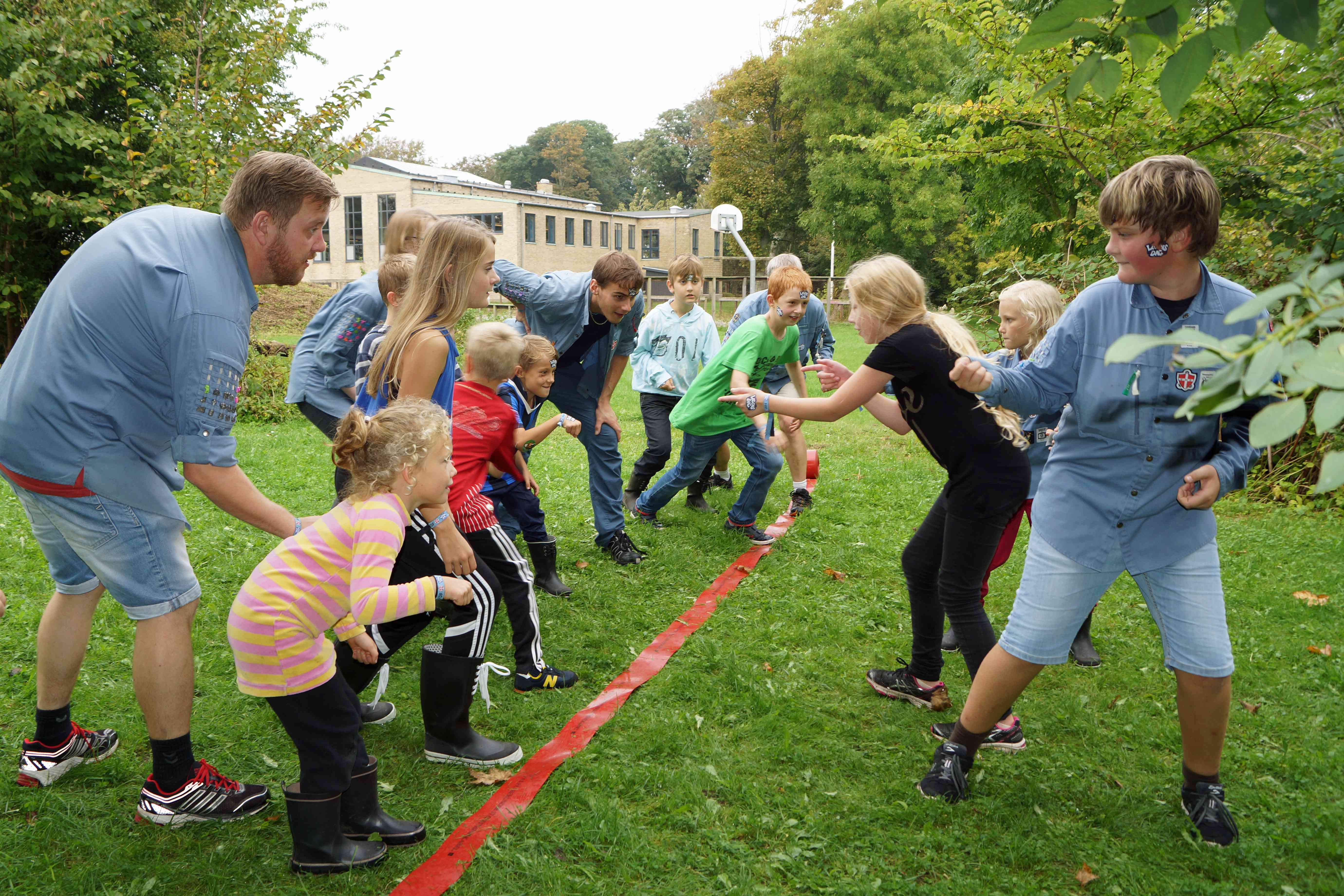 Legens Dag 2015